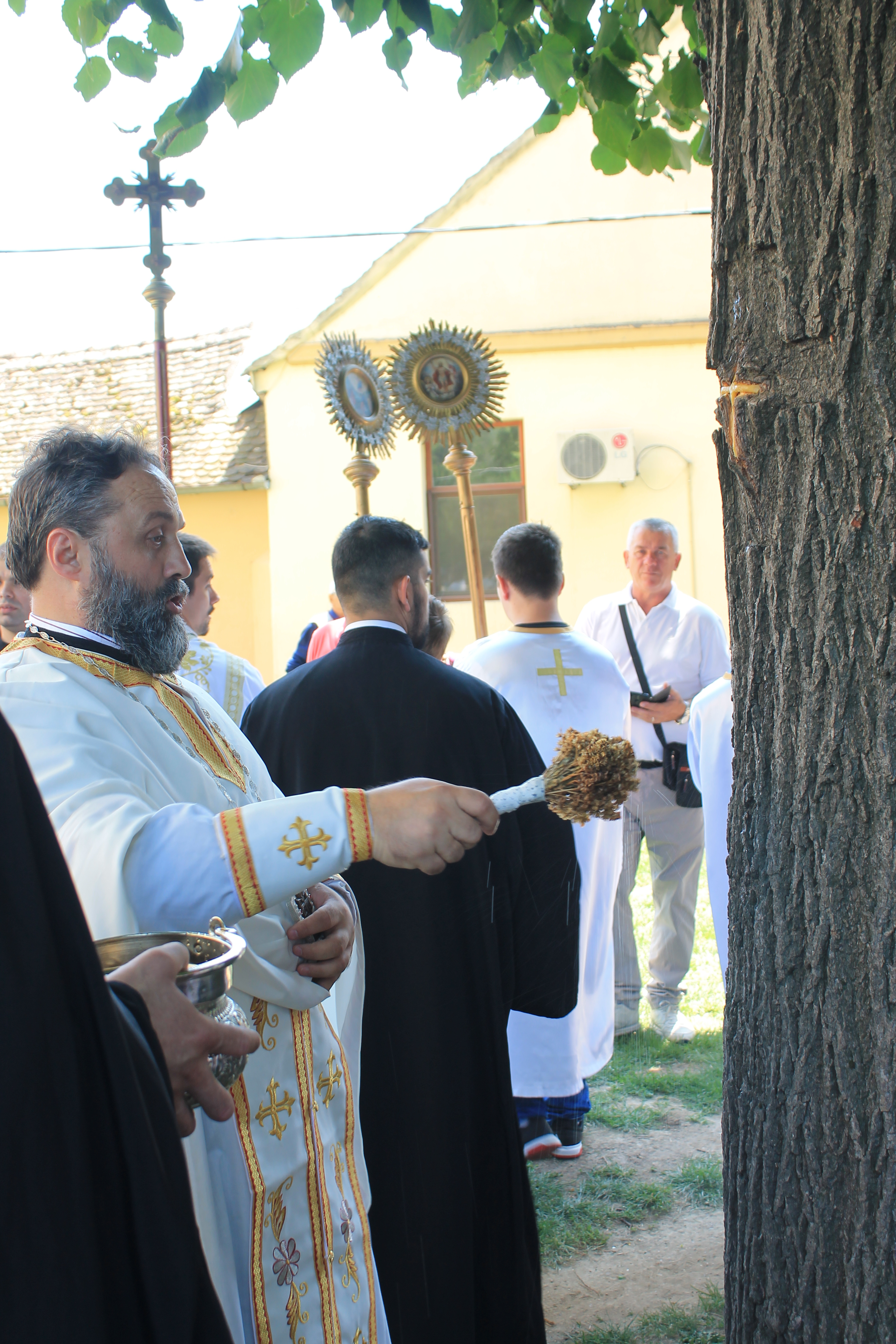 Šid, zapis u porti crkve Sv. Nikole